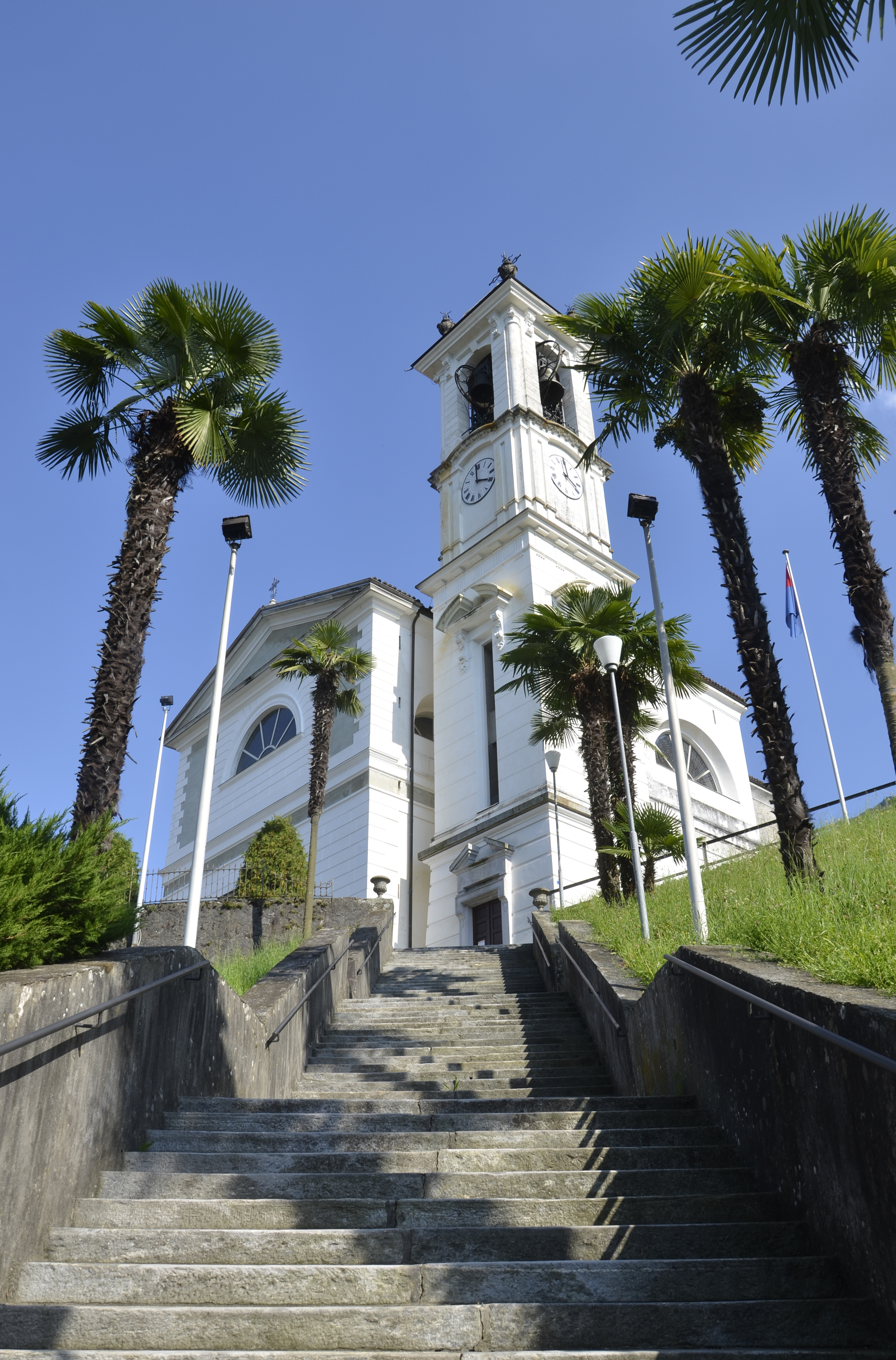 Complesso di San Carlo: chiesa e casa parrocchiale